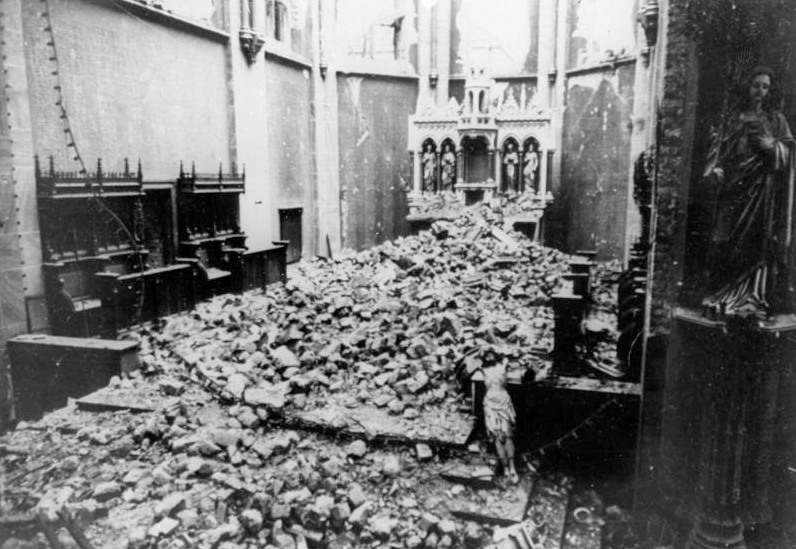 Die Trümmer der Marien-Kirche in Bochum The ruins of St. Marien church in Bochum